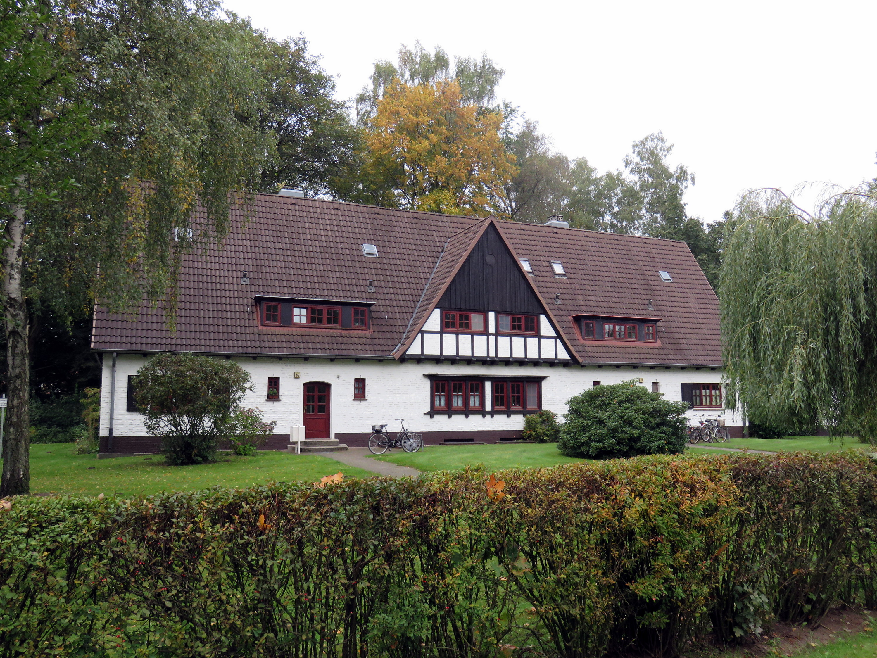 “Schwarzwald-Siedlung“ Essener Straße 69, 71 in Hamburg-Langenhorn. This is a photograph of an architectural monument. (1137)